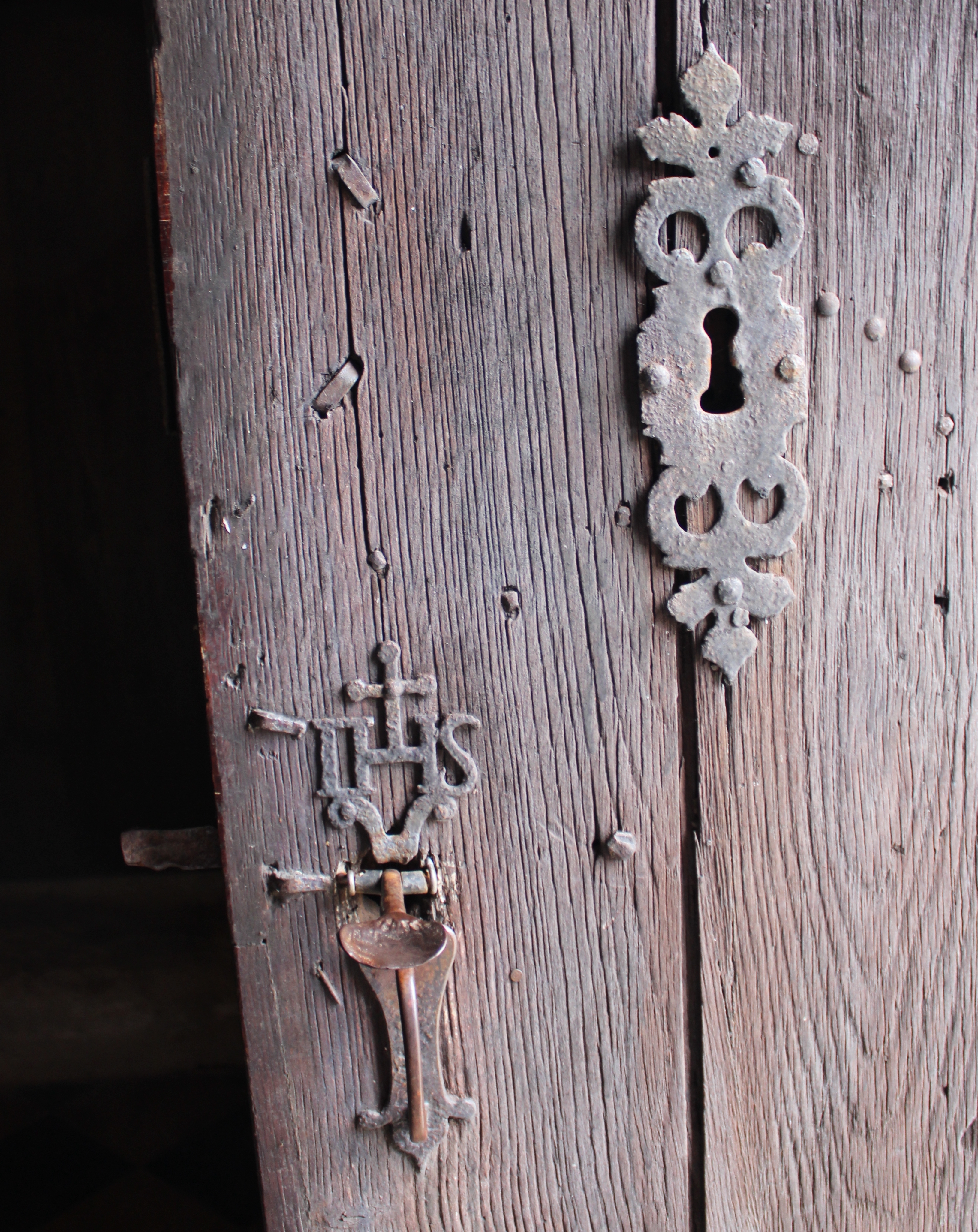 Monogramme IHS en fer forgé sur la porte de l'église fortifiée de Burelles XVIIè siècle.